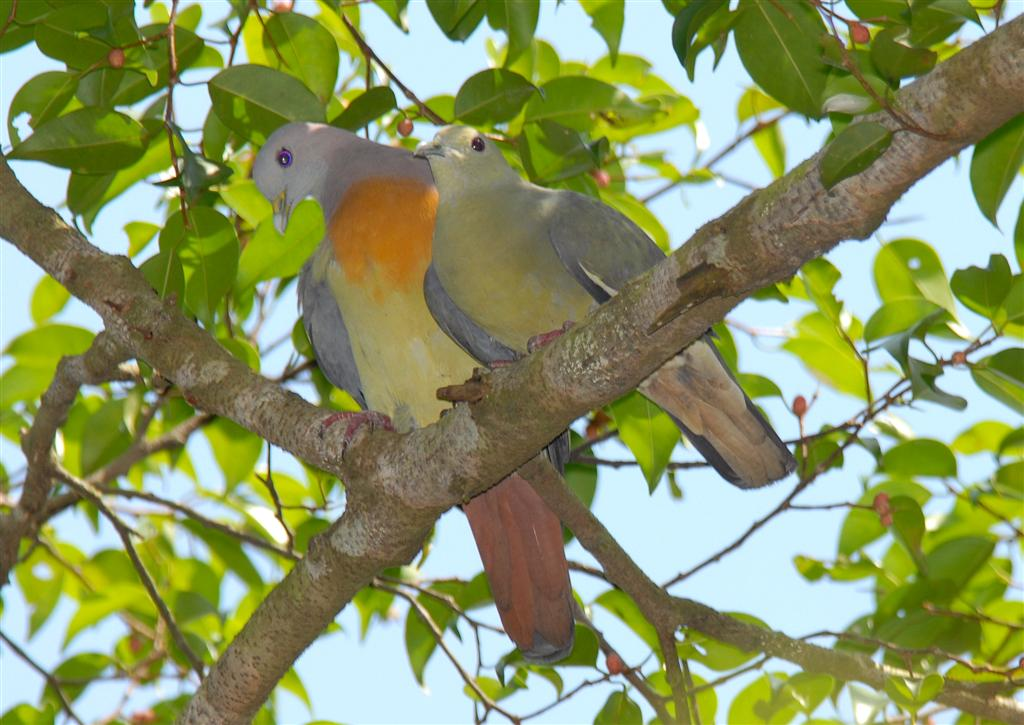 Pink-necked Green Pigeons (Male & Female)(Treron vernans)